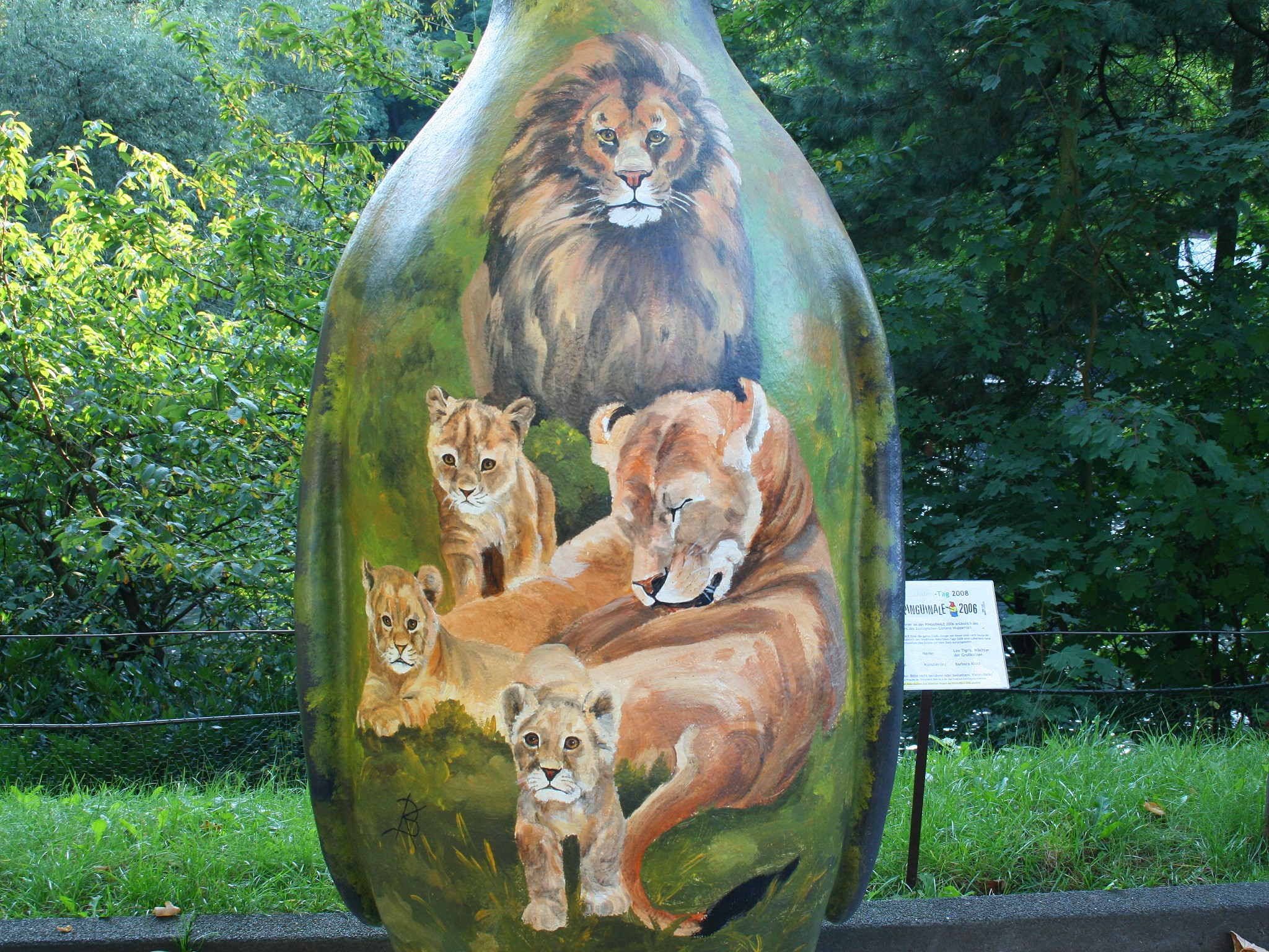 NRW-Tag im Zoo Wuppertal